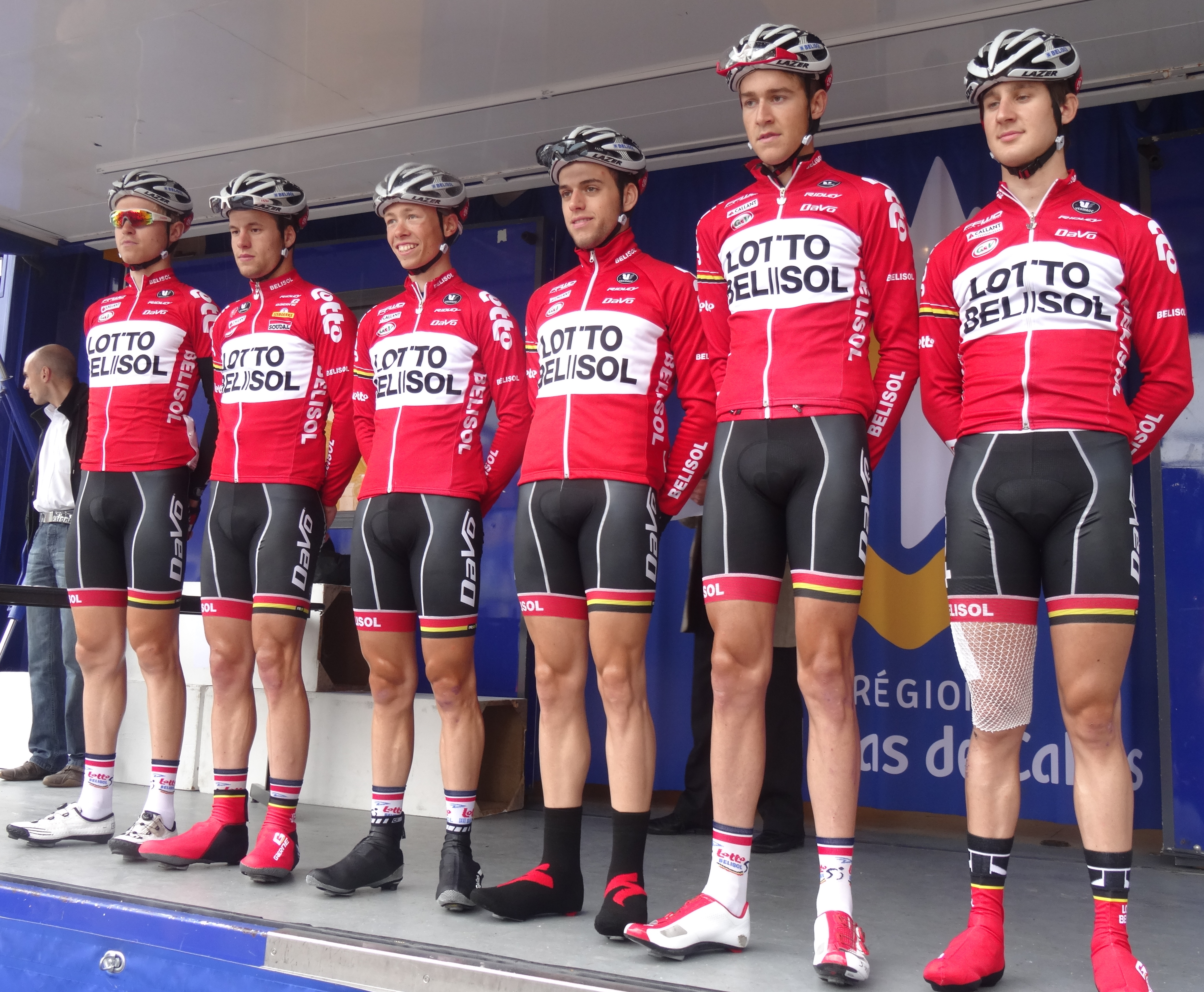 Reportage photographique réalisé le dimanche 13 juillet à l'occasion du départ et de l'arrivée de la Ronde pévéloise 2014 à Pont-à-Marcq, Nord-Pas-de-Calais, France.